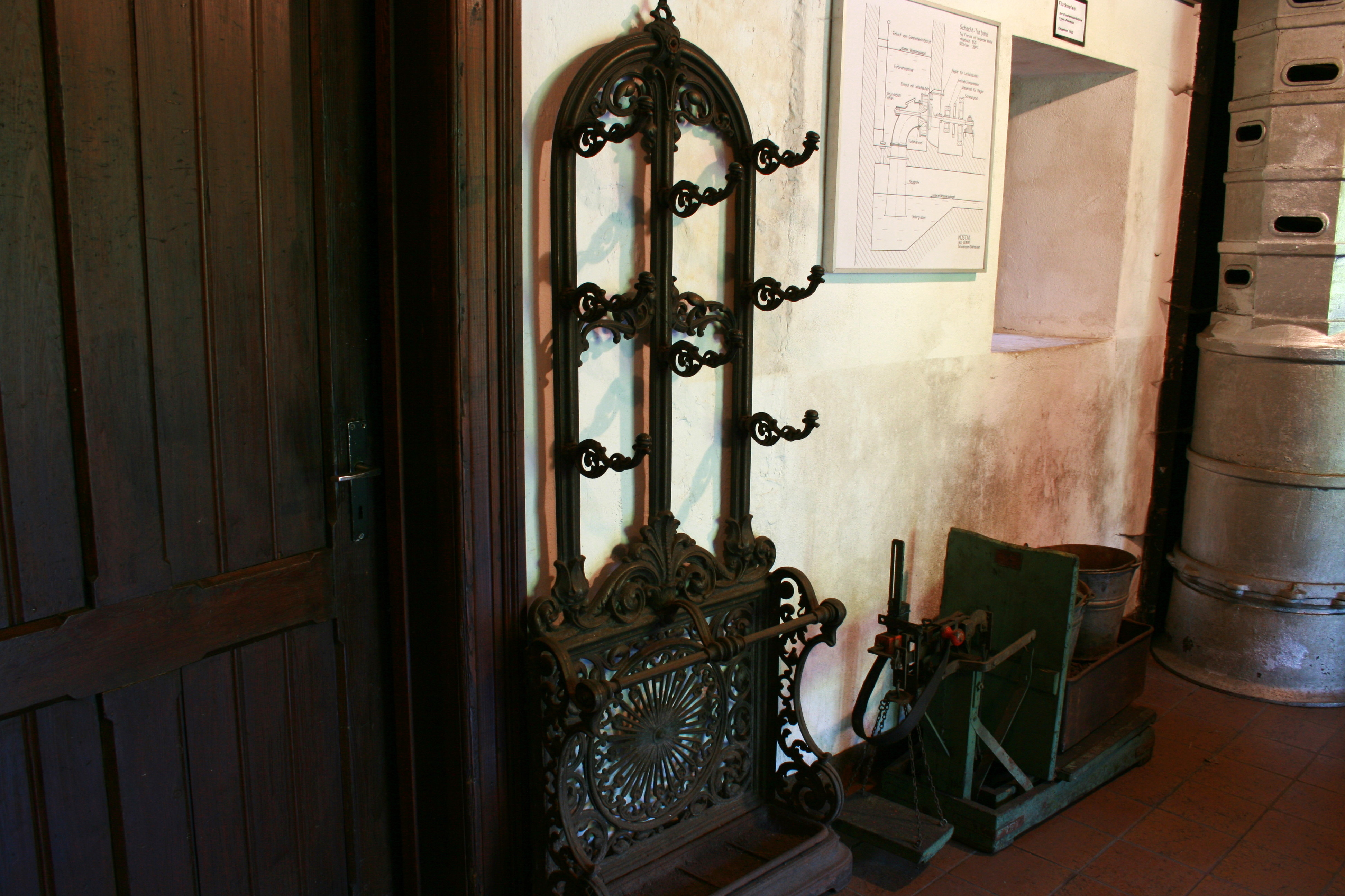 Flurgarderobe mit Kleiderhaken und Schirmständer im Bremecker Hammer in Lüdenscheid, Deutschland.